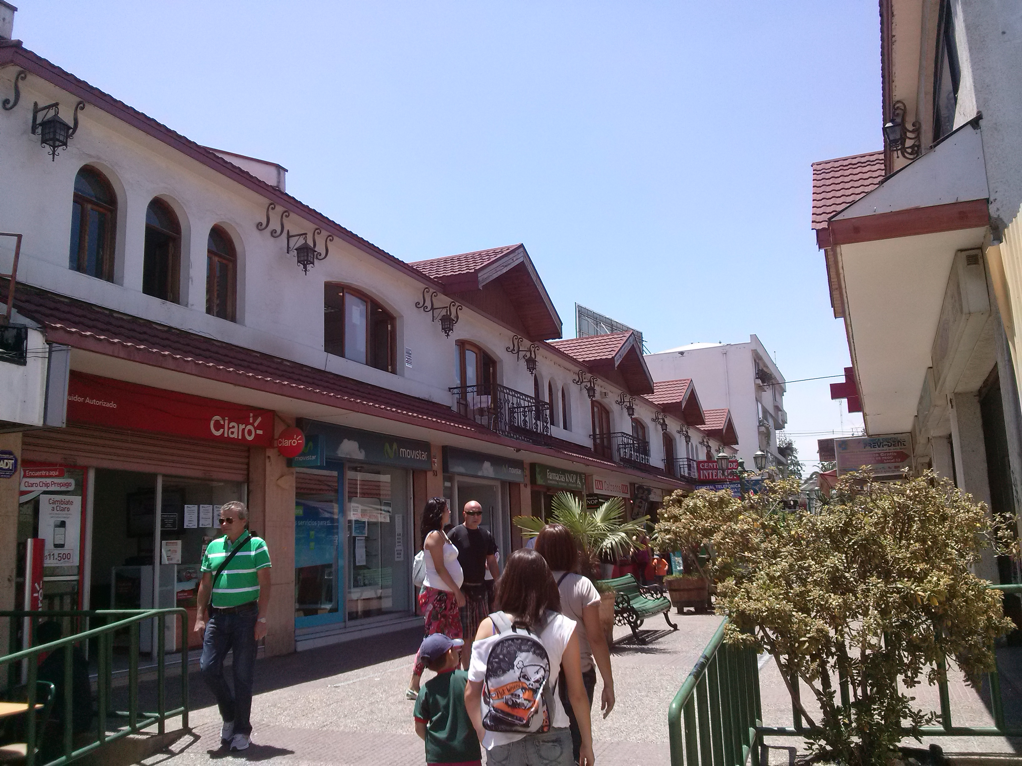 Paseo peatonal Manuel Rodriguez Ubicado en el centro de la ciudad de Puente Alto